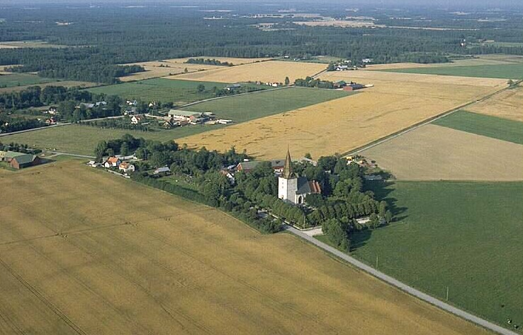 Motiv: Barlingbo kyrka Nyckelord: Flygbilder, Riksintressen Kategori: KyrkomiljöBarlingbo kyrka